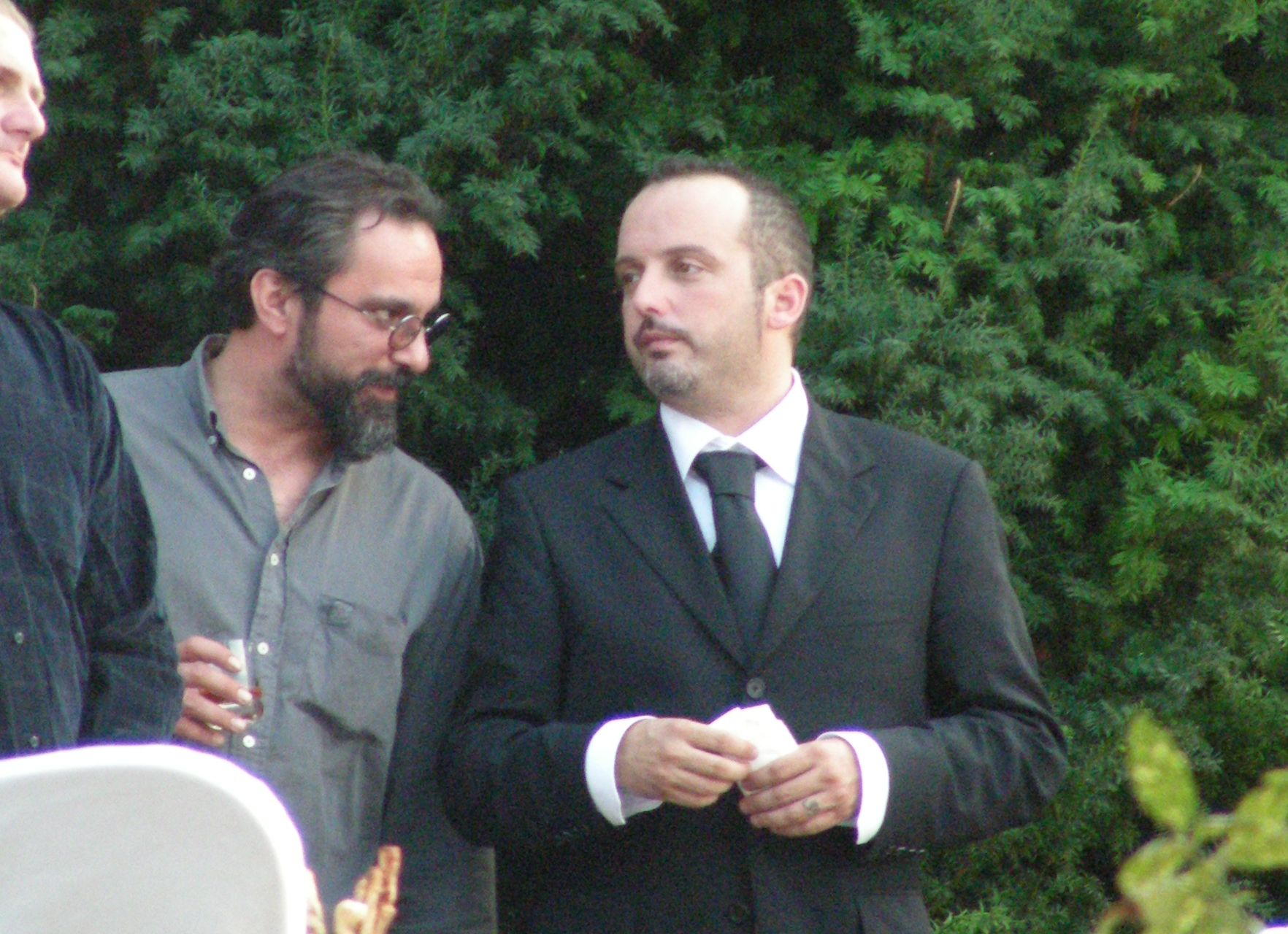 Tony Cetinski i Filip Šovagović